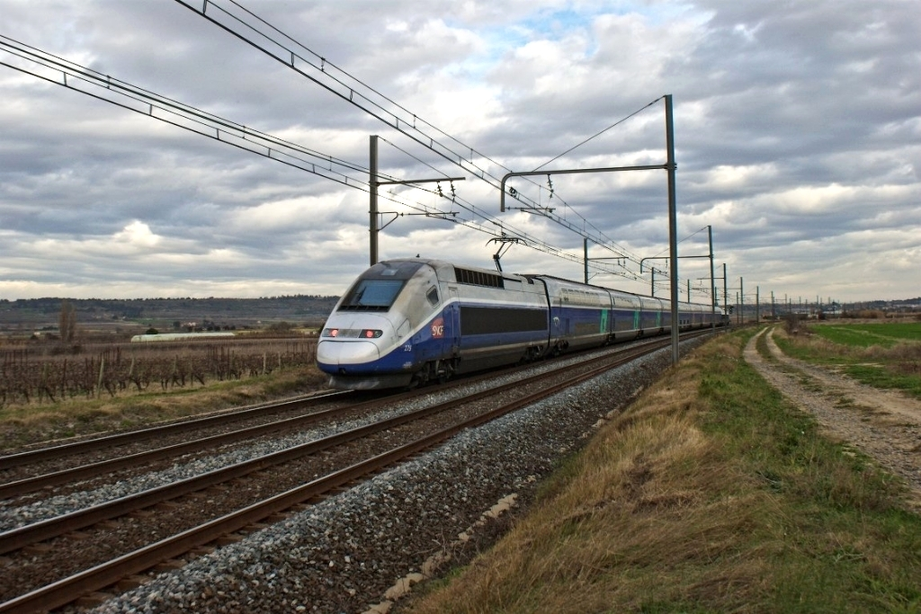 Dels múltiples TGV que es van deixar veure a la jornada ferroviària, en van passar de tots colors, en simple i en doble, deu ni do la varietat, que als afeccionats ja ens agrada. A la imatge el TGV Duplex 275 en direcció Béziers. De los múltiples TGV que se dejaron ver en la jornada ferroviaria, pasaron de varias decoraciones, en simple y en doble, bastante variedad que a los aficionados ya nos gusta. En la foto el TGV Duplex 275 dirección Béziers.